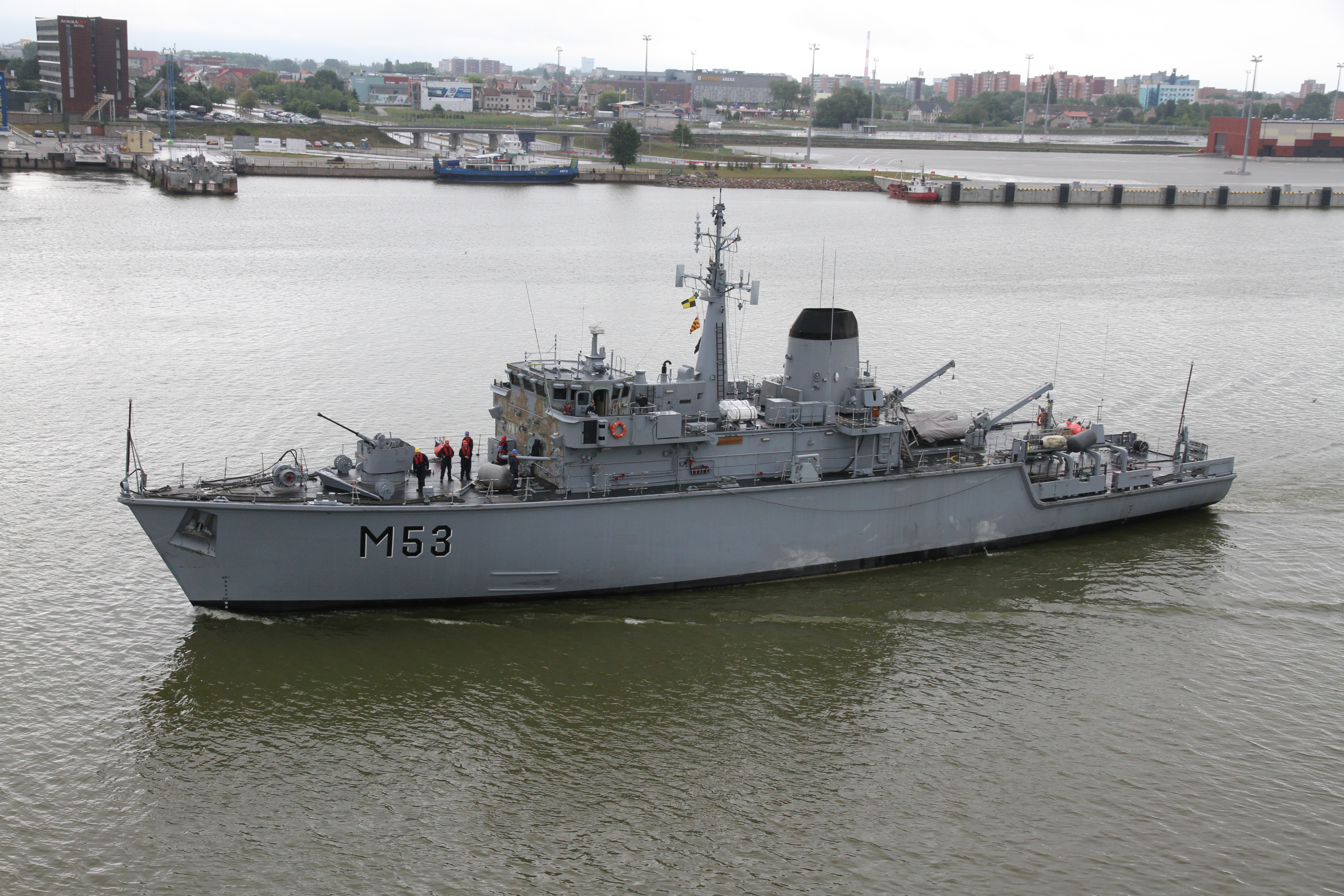 M53 Skalvis ex HMS Cottesmore in Klaipėda, Lithuania 13 july 2014